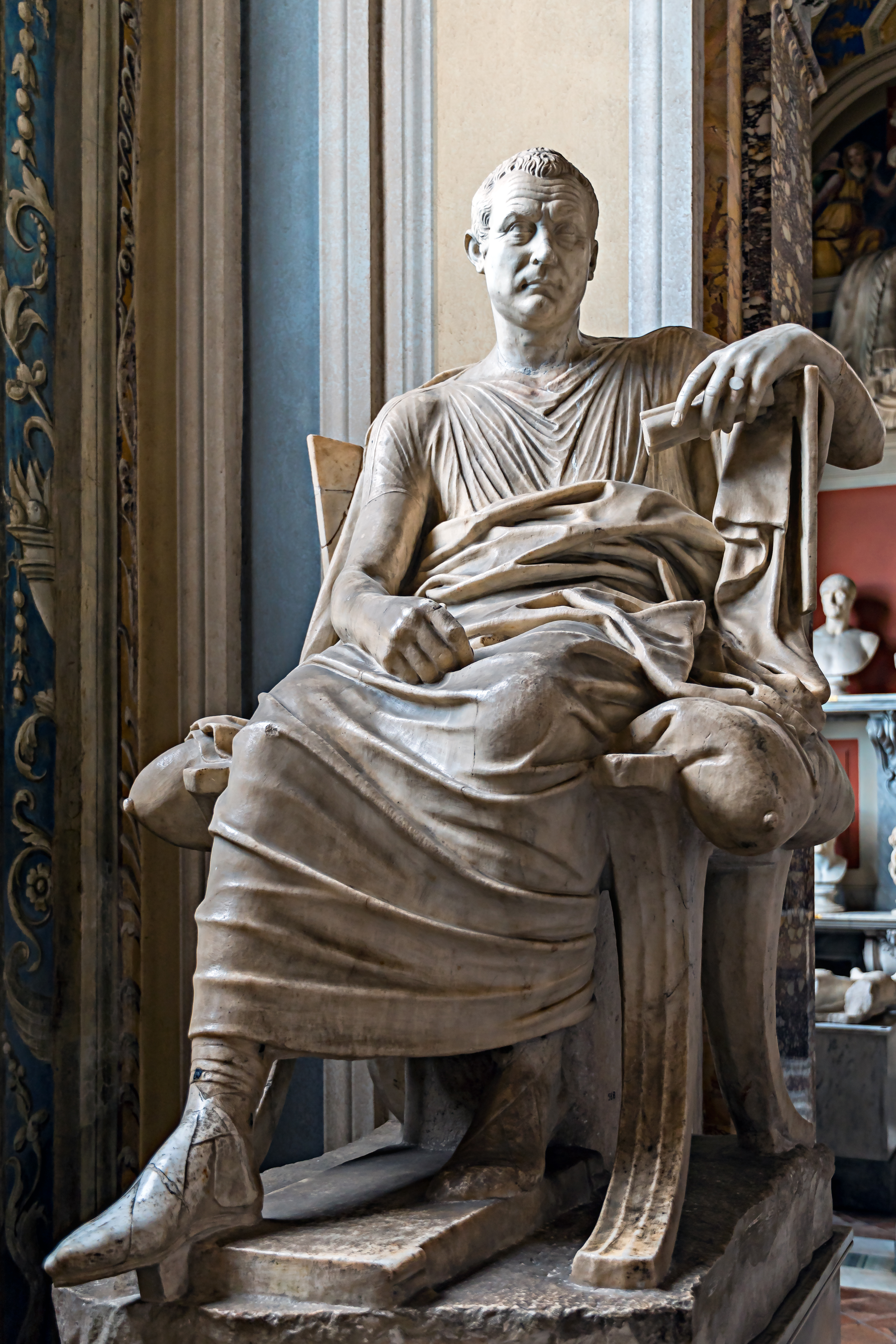 In der Pose des sogenannten sitzenden Dichters Menander aus dem 3. Jahrhundert v. Chr., ließ sich ein römischer Adliger aus der zweiten Hälfte des 1 Jahrhunderts v. Chr. darstellen. Die Plastik wurde in der Nähe der Kirche St. Pudenziana gefunden und ist in den Vatikanischen Museen ausgestellt (Inv. 588).